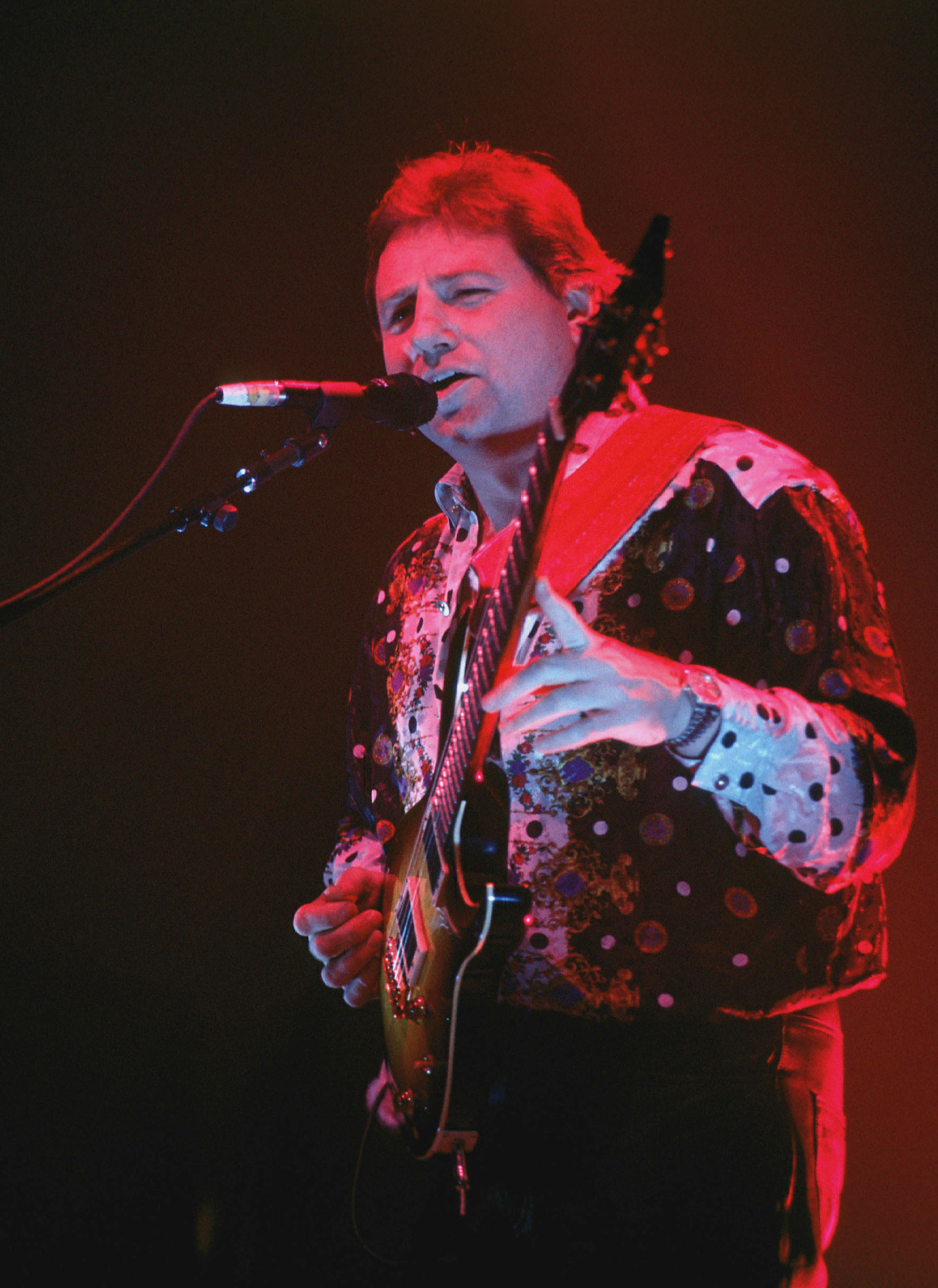 Greg Lake del gruppo progressive-rock Emerson, Lake & Palmer in concerto nel 1992